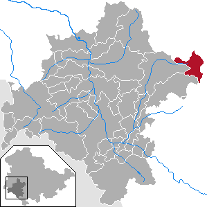 Oberhof in Thuringia - District Schmalkalden-Meiningen